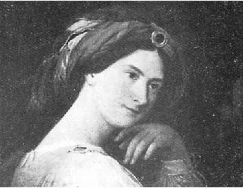 Dipinto raffigurante Nina Giustiniani, nobildonna e patriota genovese, a venticinque anni. Autore: Ferdinando Cavalleri (1794-1865).